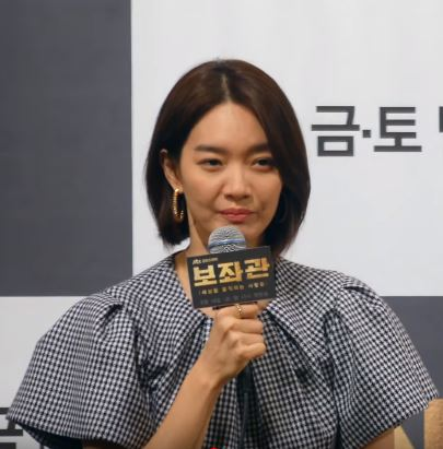 13일 오후 서울시 강남구 논현동 임피리얼 팰리스 서울에서 JTBC 새 금토드라마 '보좌관-세상을 움직이는 사람들' 제작발표회가 열려 신민아X이엘리야가 기자의 질문에 답변을 하고 있다.